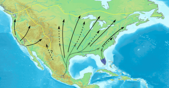 Wanderung und Verbreitung des Monarchfalters (Danaus plexippus) in Nordamerika (Animation)